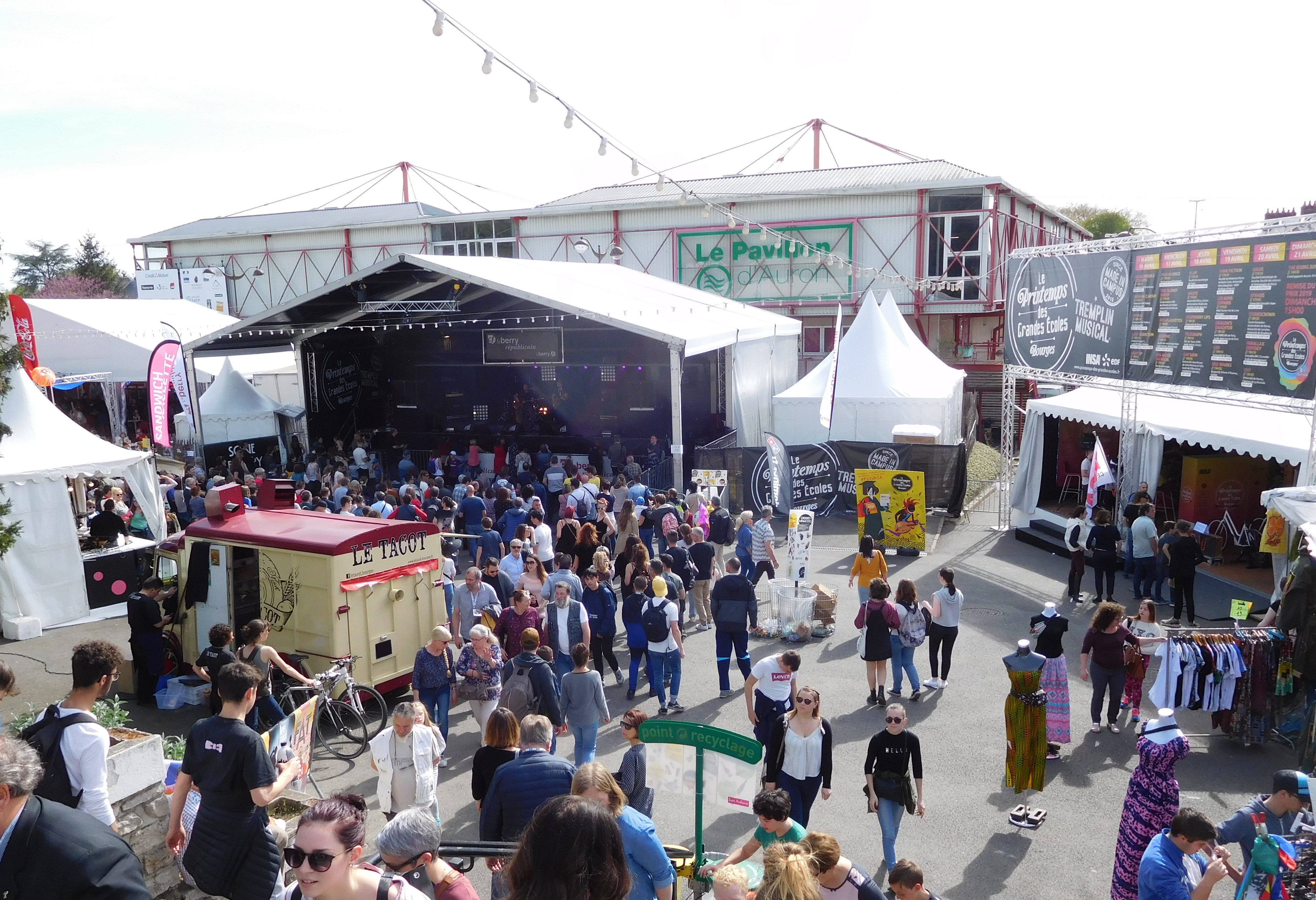 Place Miles-Davis (rives d'Auron) : festivaliers, la scène Le Berry, le Printemps des Grandes Écoles (organisé par l'INSA Centre Val de Loire en partenariat avec EDF), stands, restauration. Au loin, le Pavillon d'Auron.